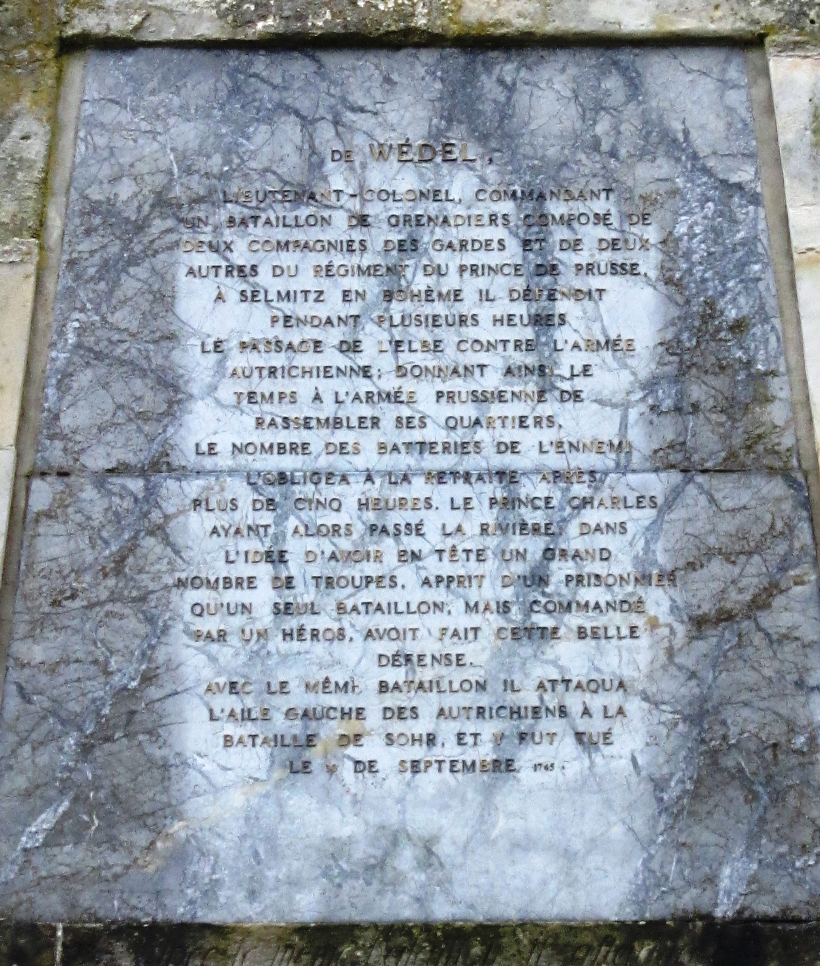 Ehrentafel für Georg Vivigenz von Wedel (1710-1745) am Obelisken in Rheinsberg